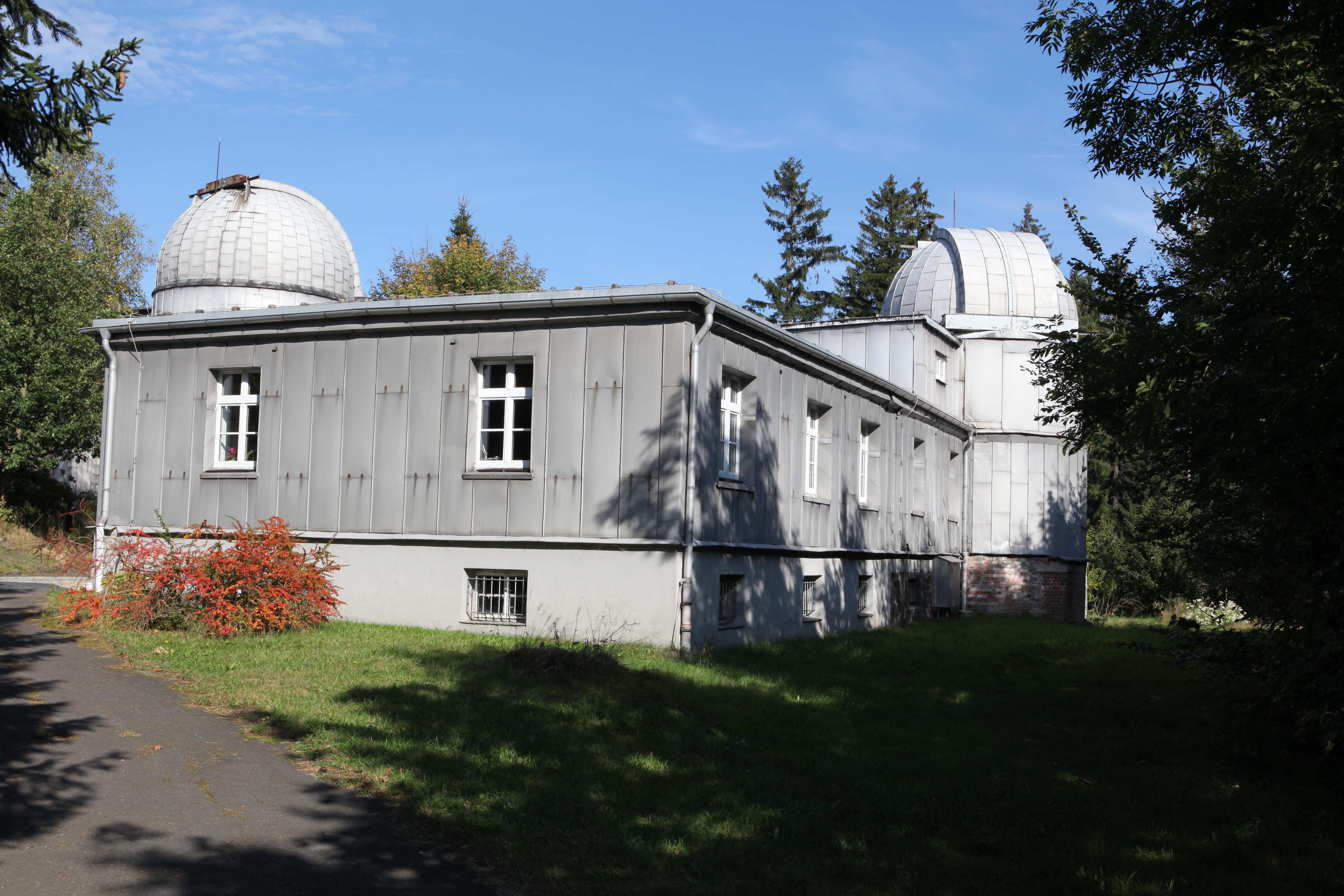 Sternwarte, Sternwartestr. 32, in Neufang OT von Sonneberg